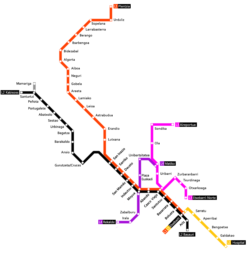 Metro Bilbao sareko mapa eskematikoa.